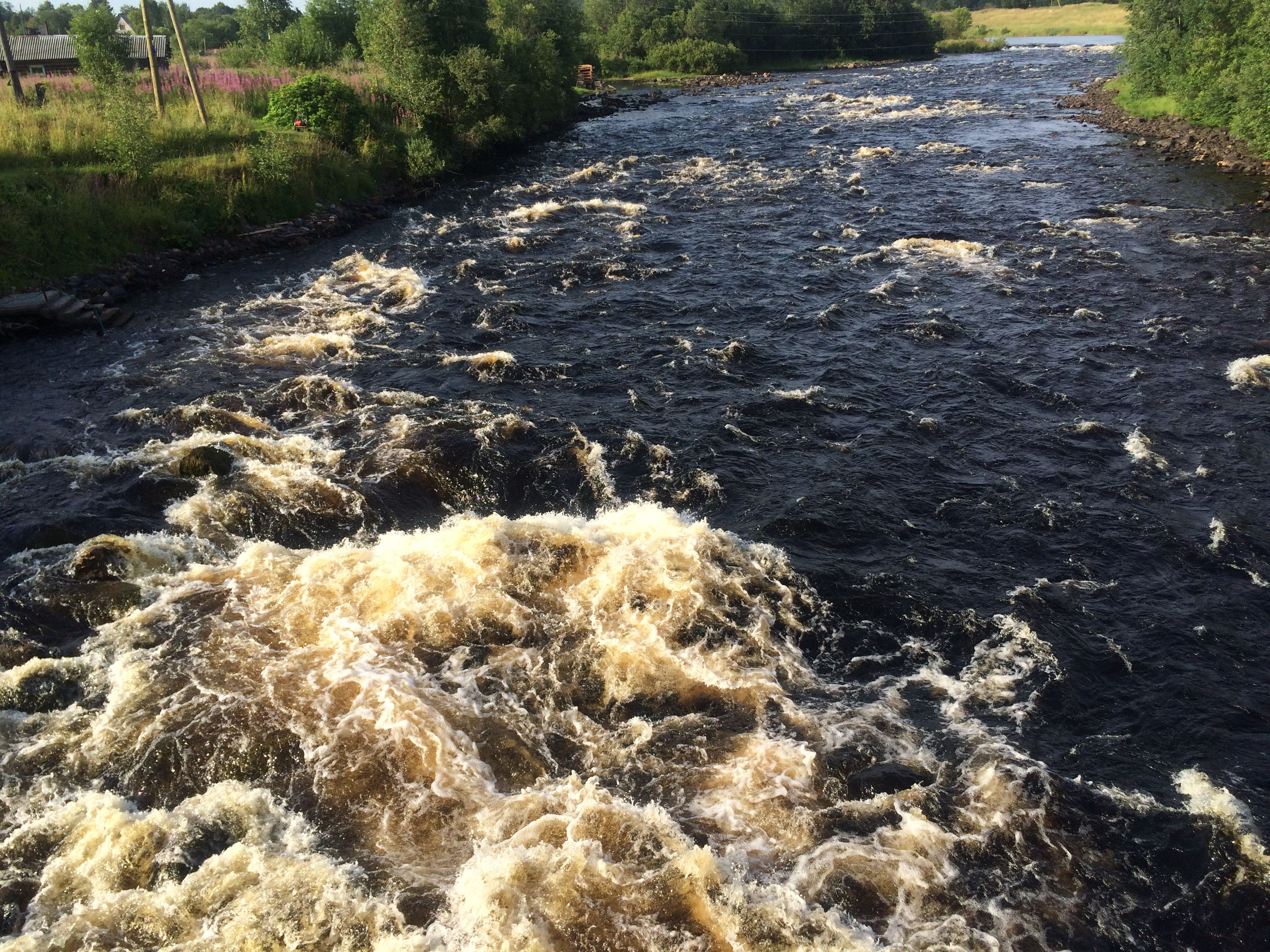 Тивдия (река)